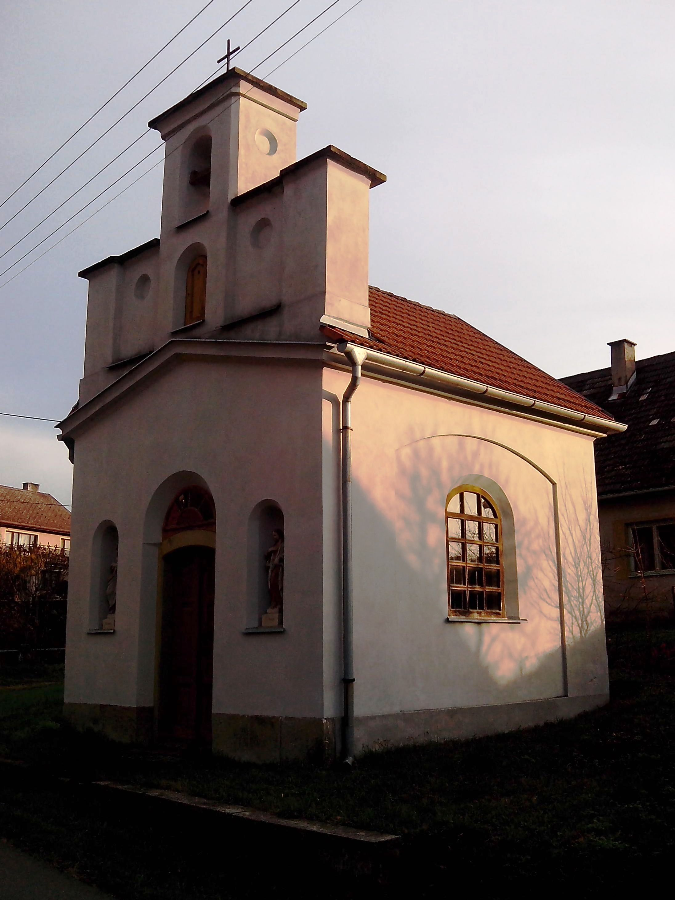 Kaple sv. Václava (Litohrady)